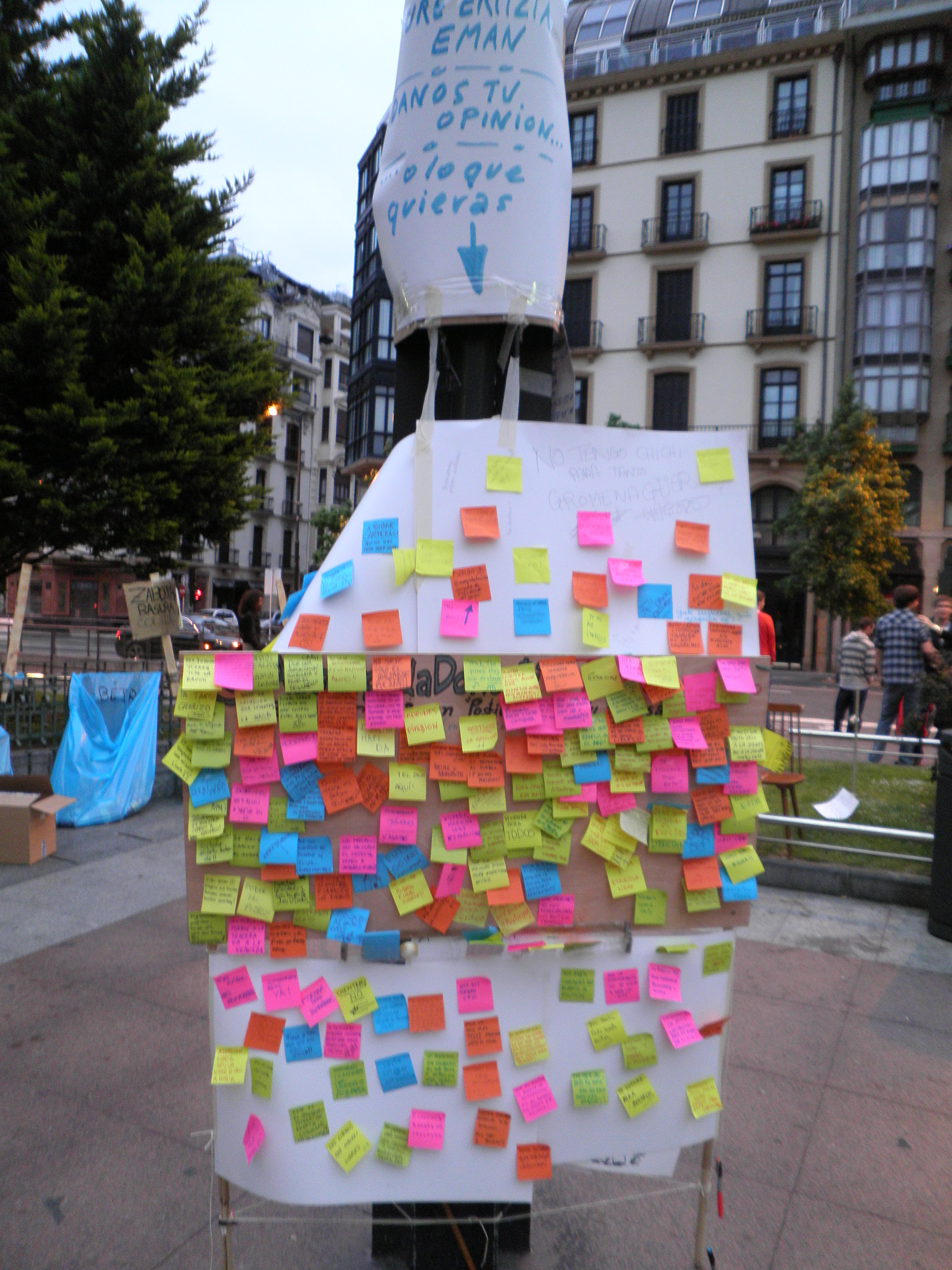 Mezuak.